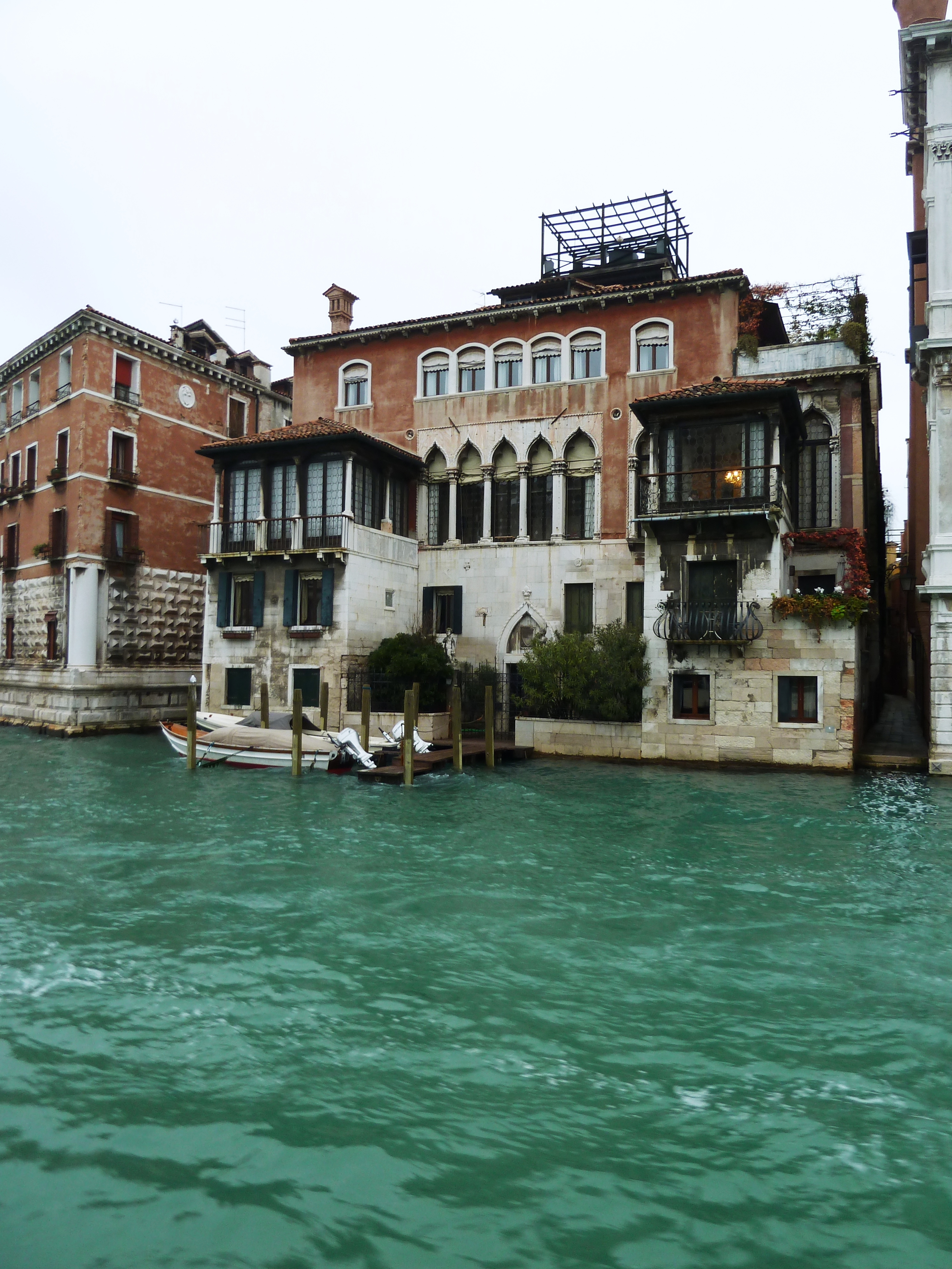 Palazzo Falier (Venice)